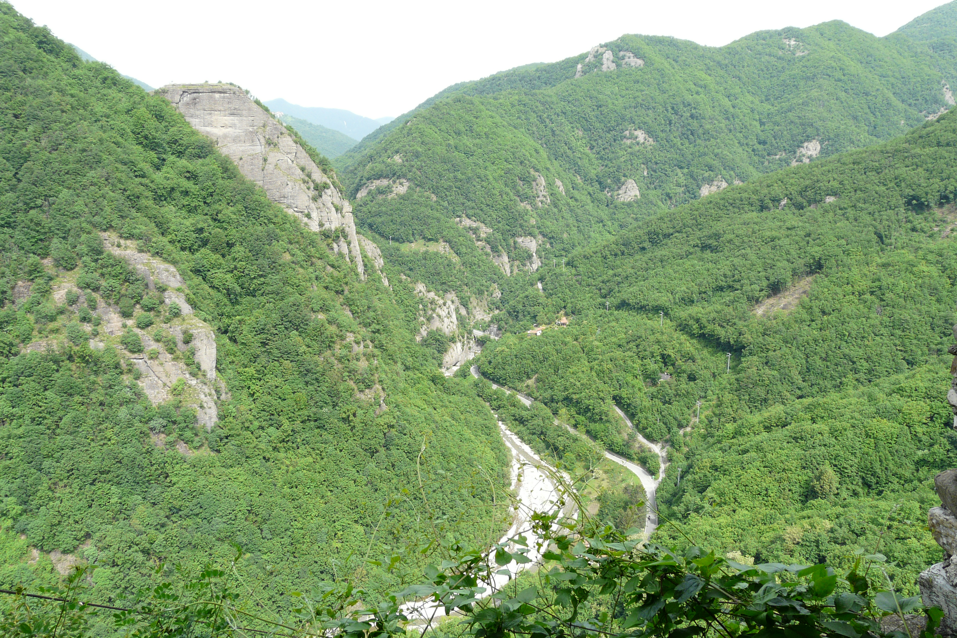 Serie di immagini interne ed esterne del Castello della Pietra di Vobbia, Liguria, Italia